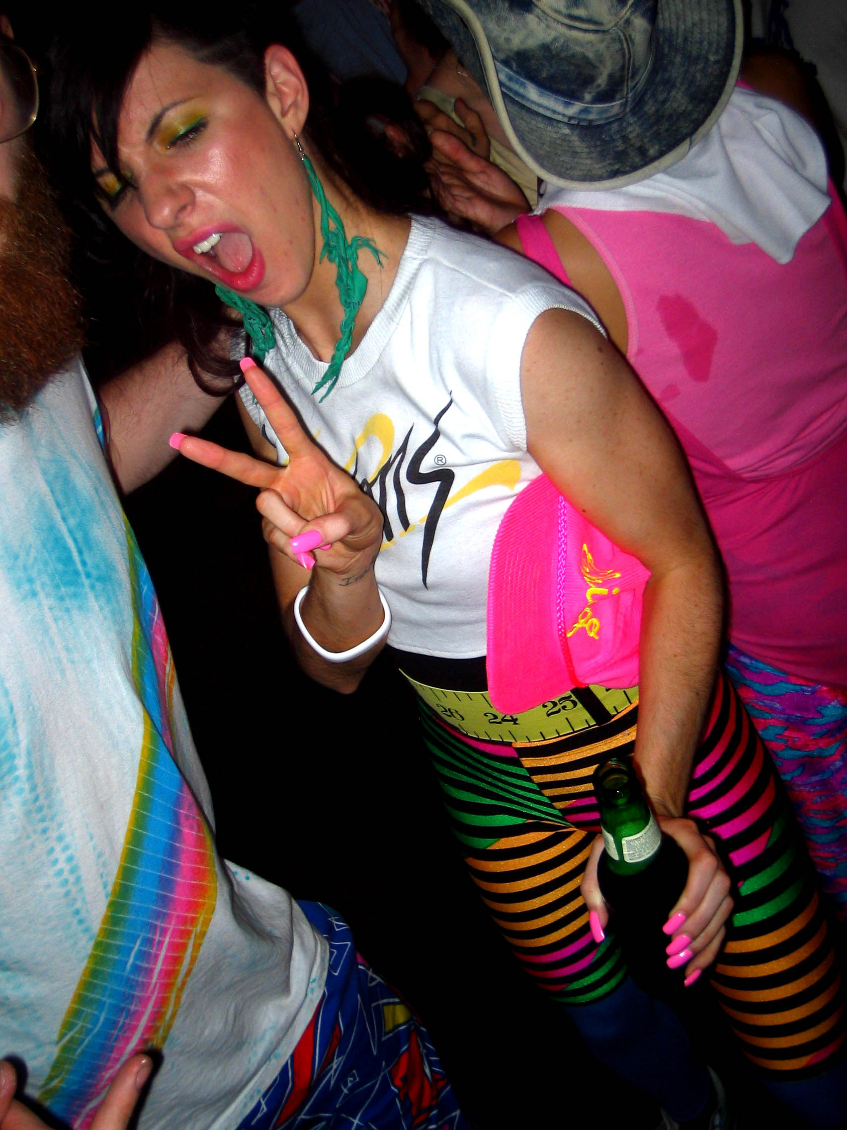 Amanda Blank